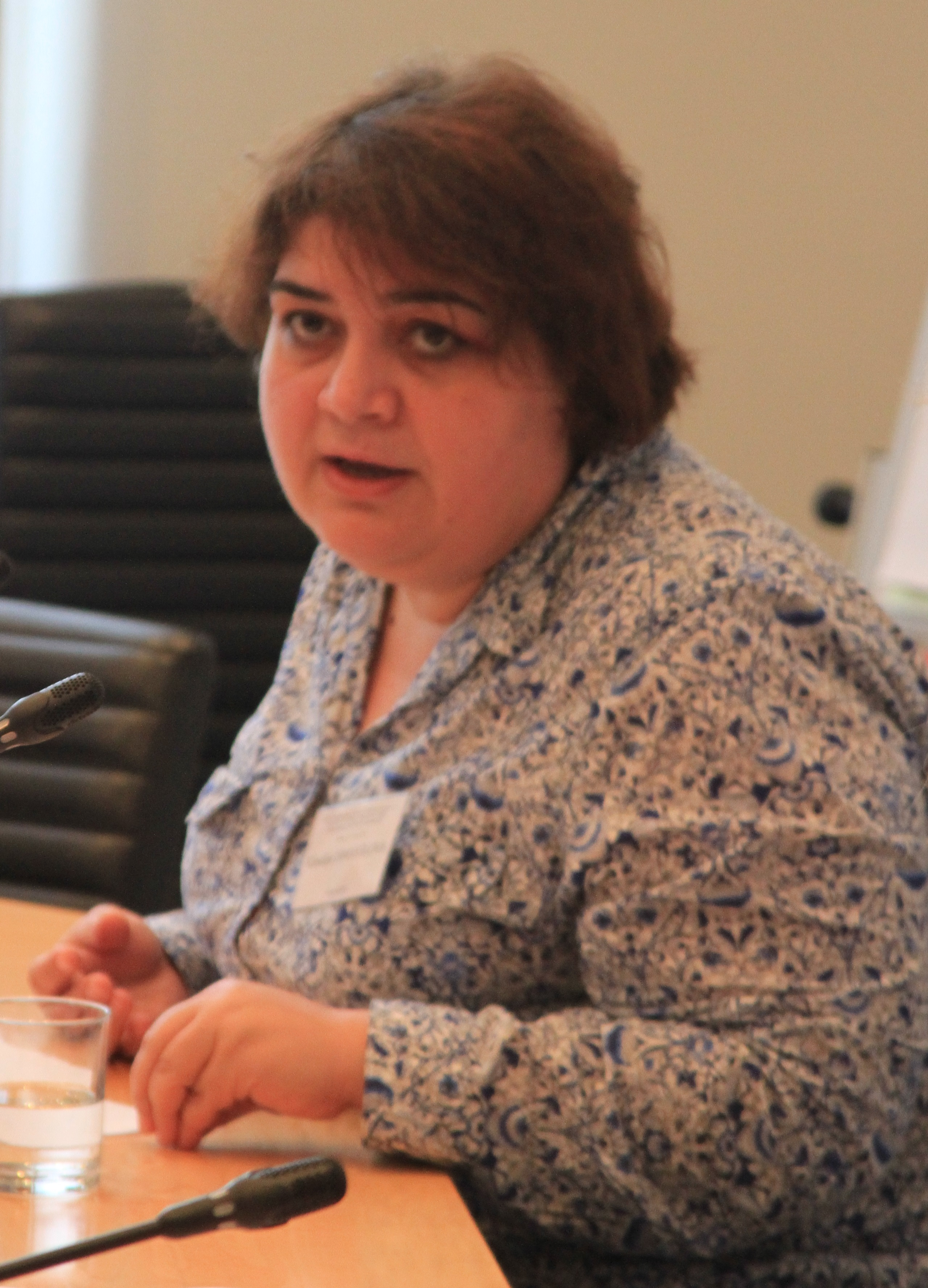 14 июля 2014 года Хадиджа Исмаилова на сайд-ивенте во время дополнительной встречи по человеческому измерению ОБСЕ (SHDM OSCE) рассказывает о пытках, применяемых в отношении политзаключенных Азербайджана. Имеется разрешение на публикацию, копия в OTRS